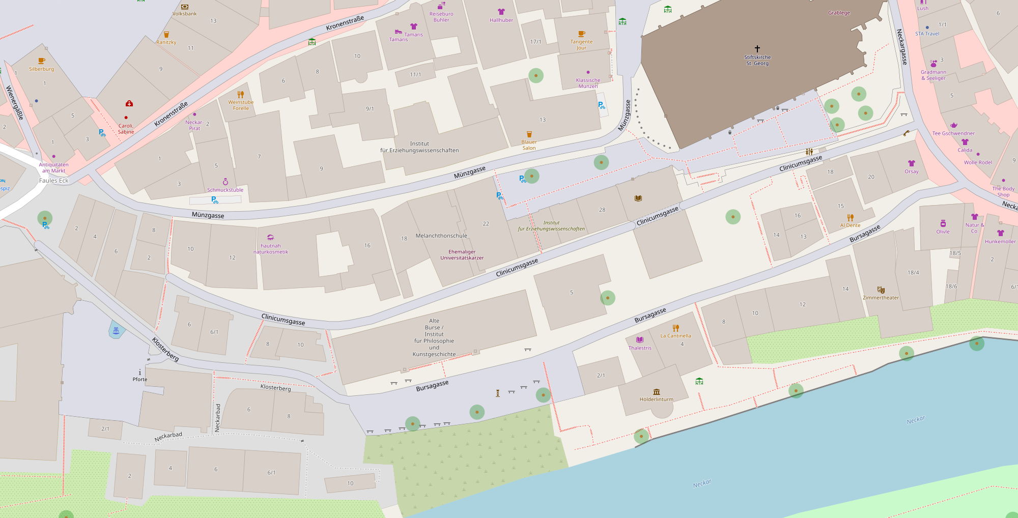 Clinicumsgasse in Tübingen (OpenStreetMap)